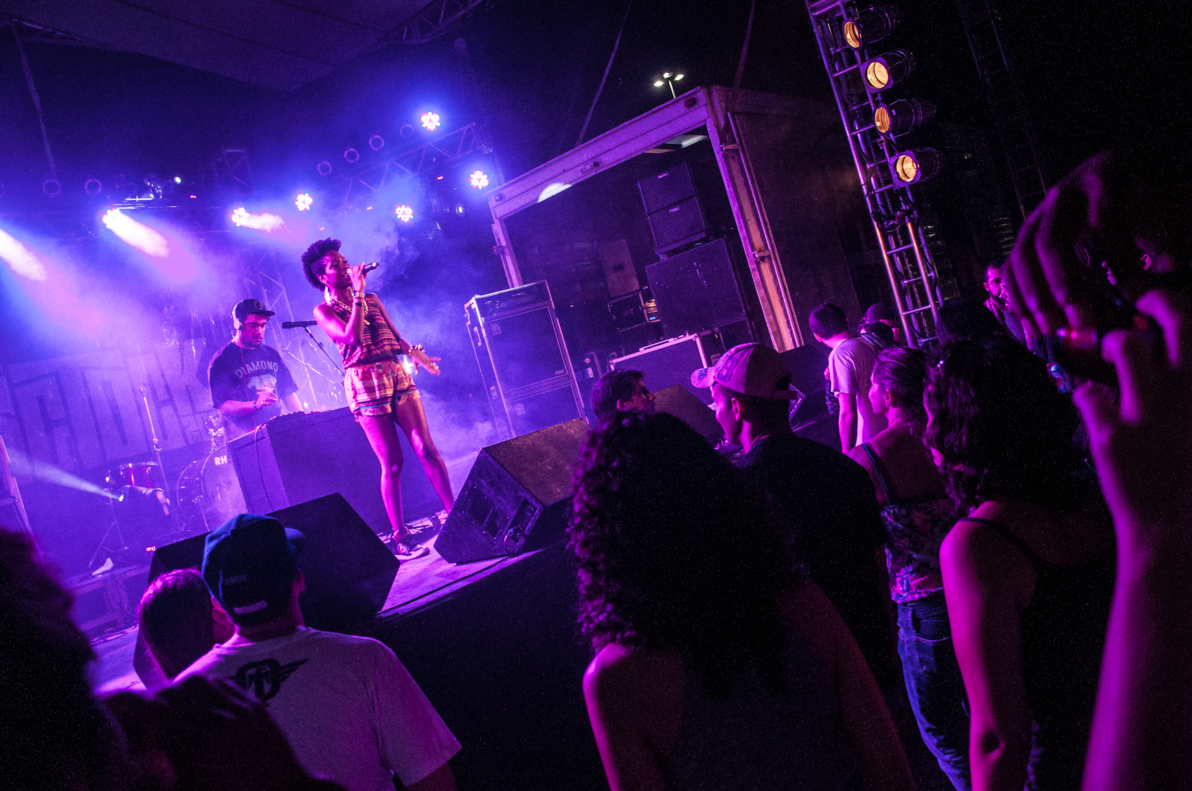 Show da Karol Conká no terceiro dia do UFSCtock 2012.